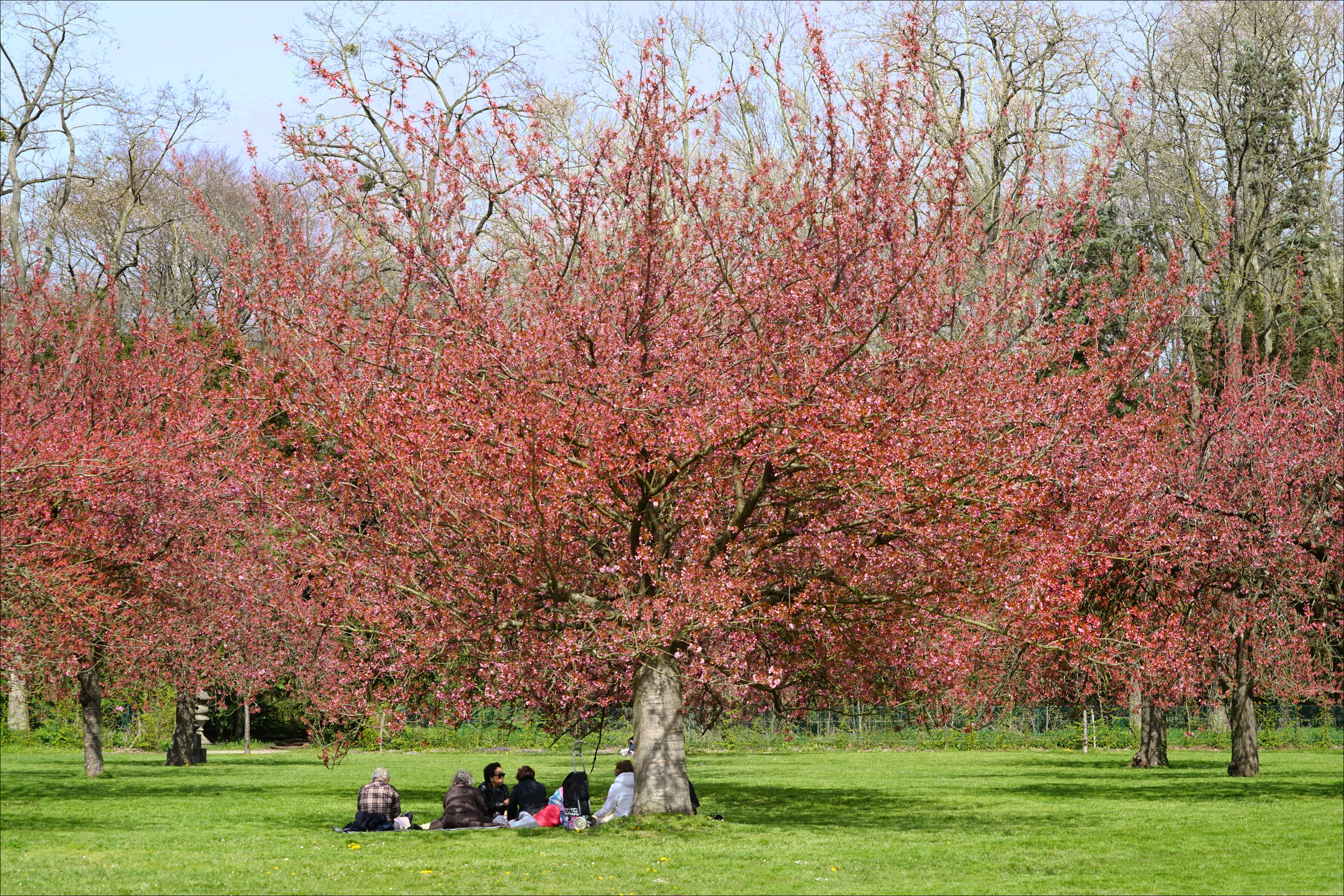 Pique-nique traditionnel sous les ceriers du Japon au début de leur floraison au Parc de Sceaux.